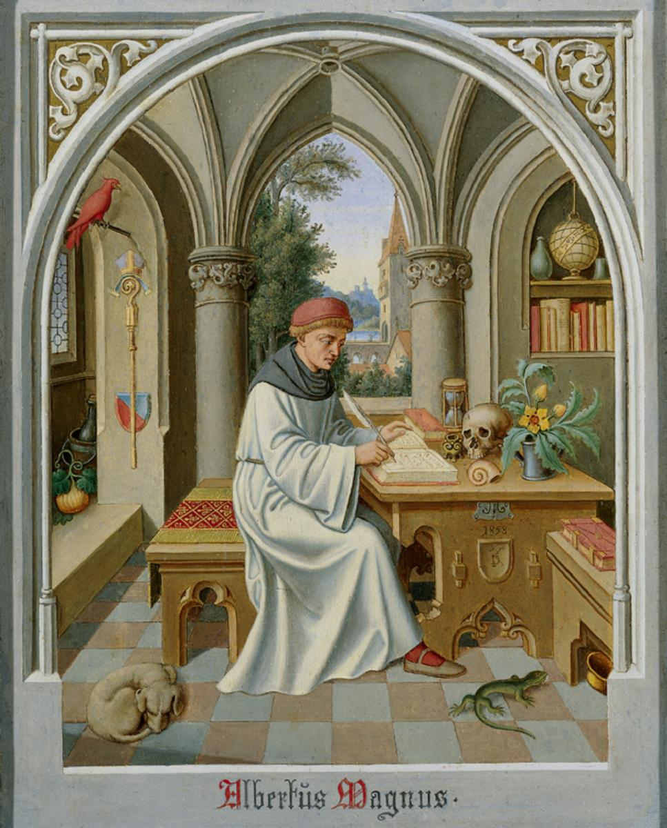 Karl Ballenberger: Der Hl. Albertus Magnus in seinem Studierzimmer, Monogrammiert und datiert Mitte rechts (auf der Tischwange): KB (ligiert)/1858. Öl auf Holz. H 25,1; B 19,7 cm.